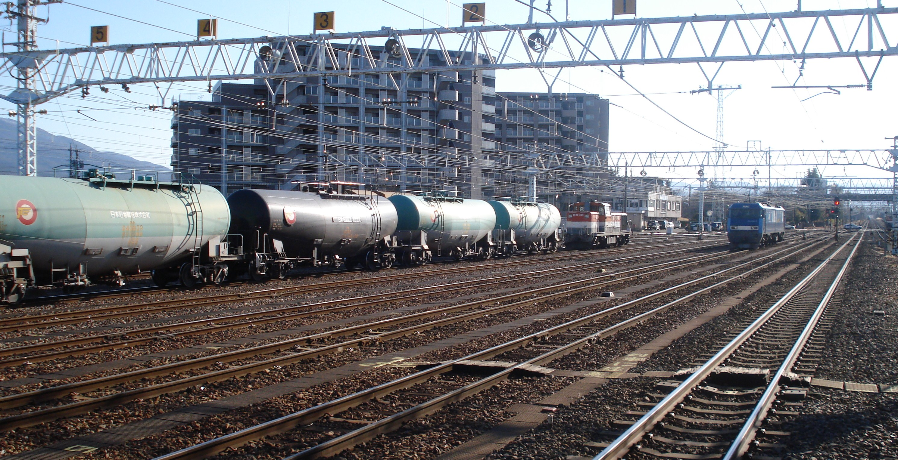 2008年1月 投稿者が撮影管理